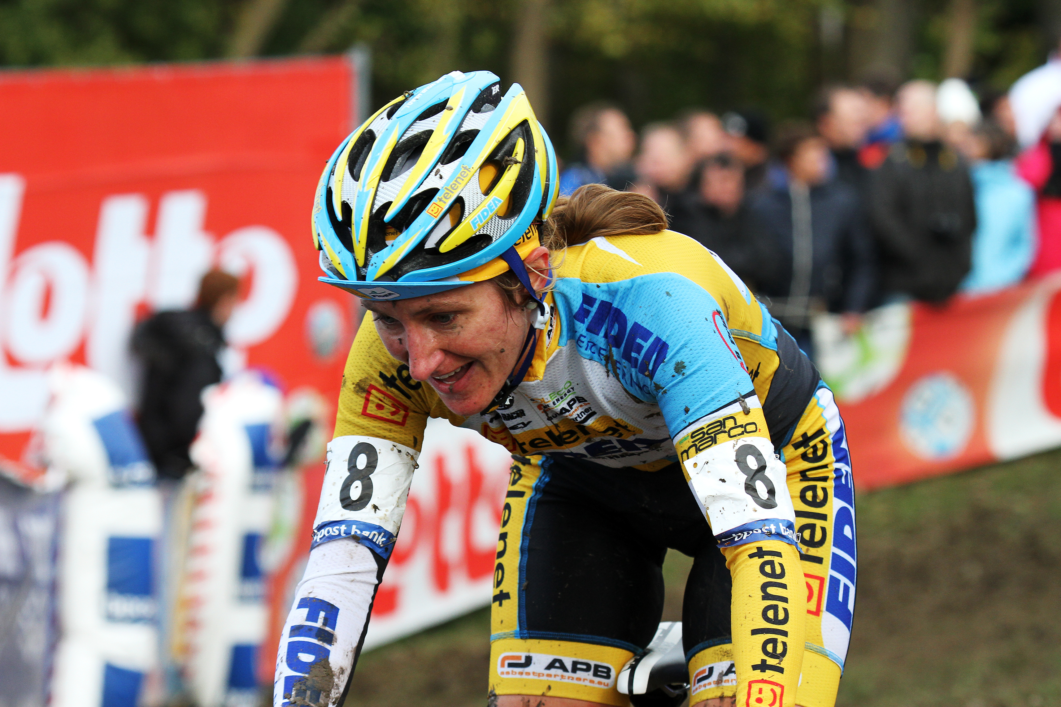 Amy Dombroski tijdens de "Koppenbergcross" 2012 te Oudenaarde (Belgie)